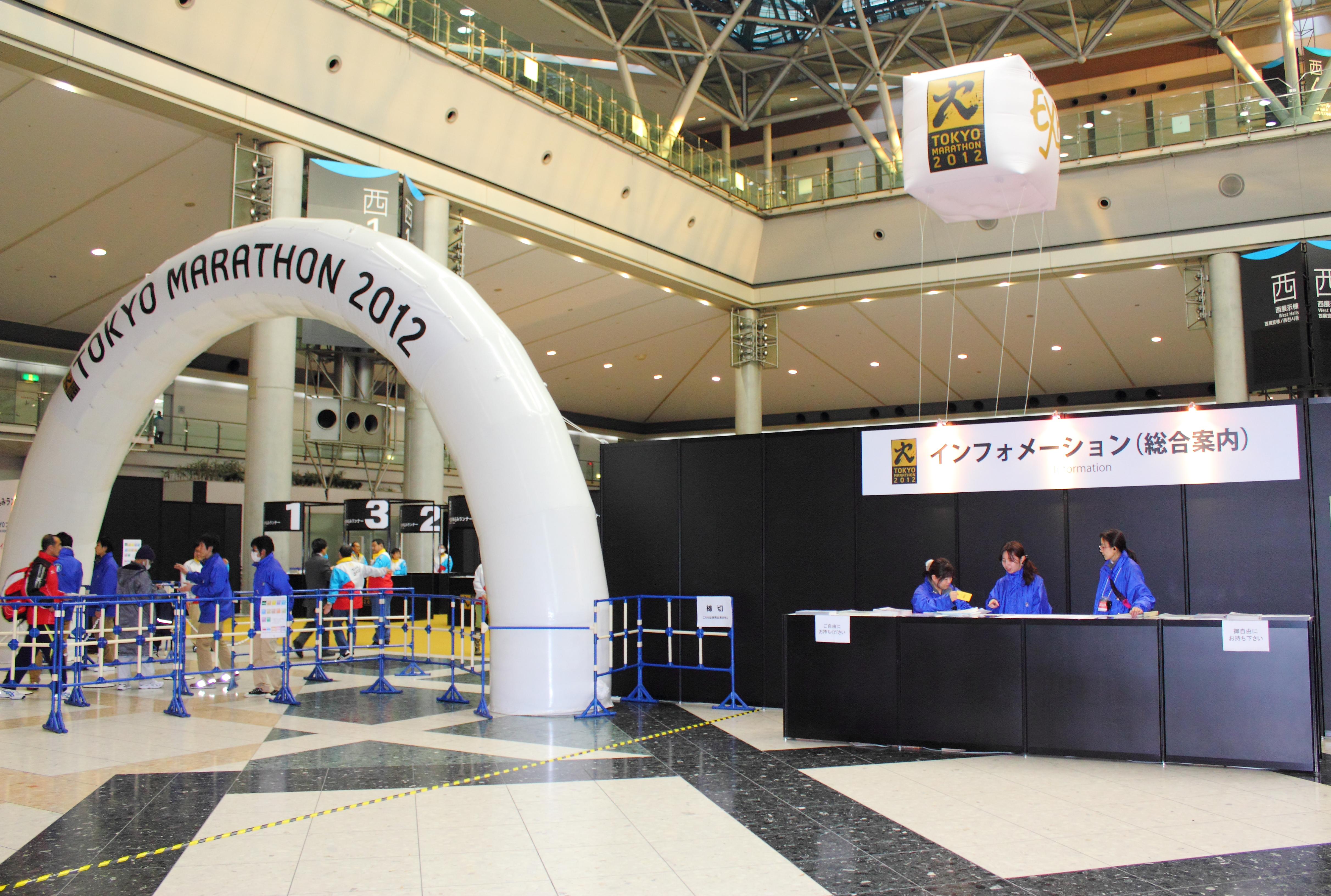 東京マラソンゼッケン配布所（東京ビッグサイト）